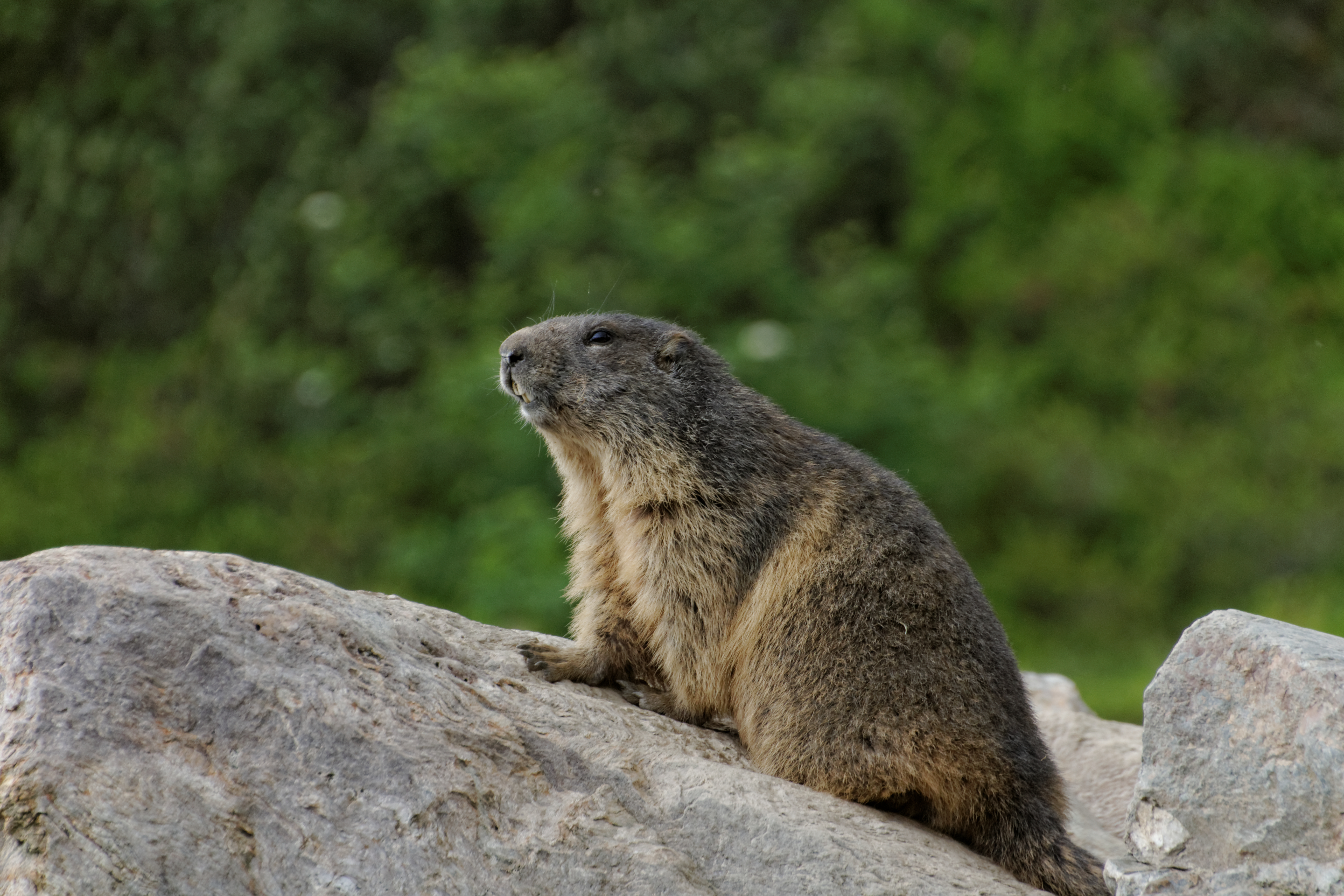 Murmeltier, Zillertal Austria